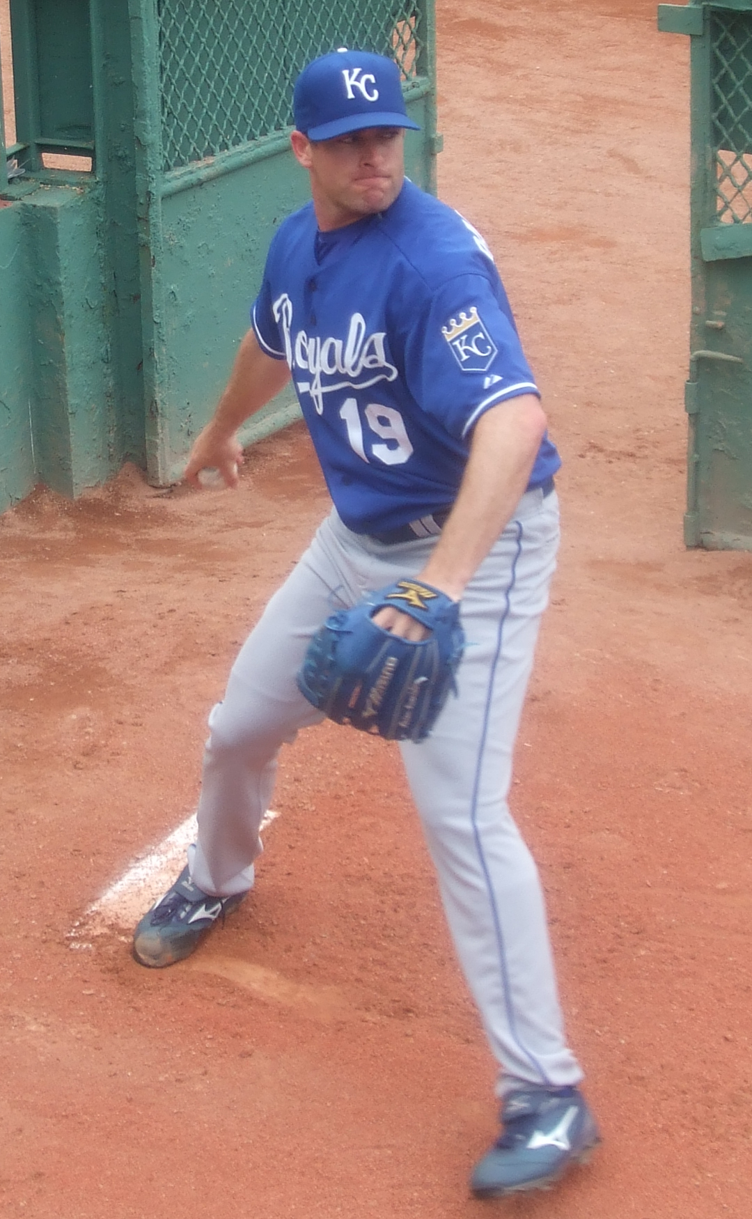 Brian Bannister